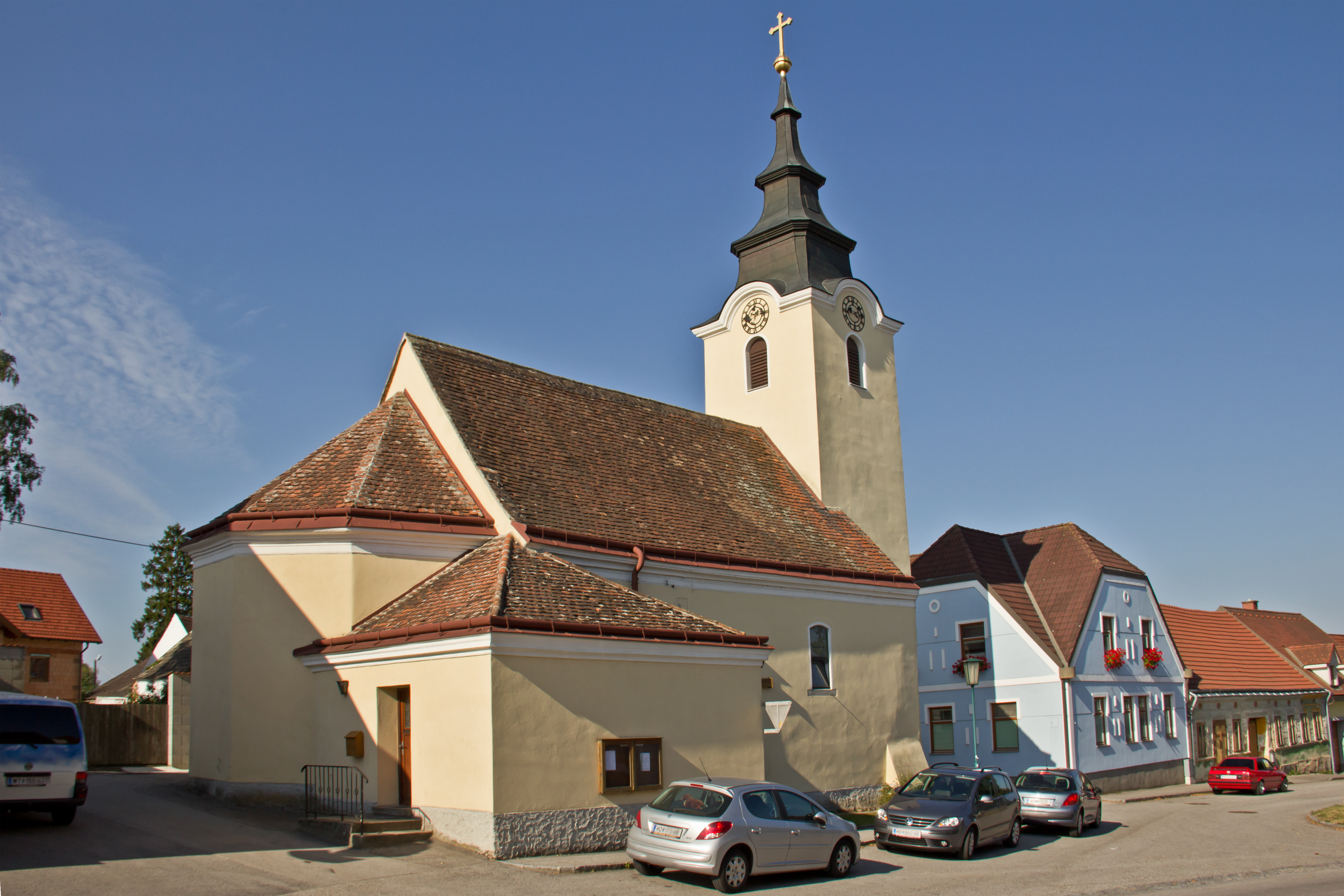 Die schlichte, barocke Saalkirche mit Westturm und nördlichem Sakristeianbau steht am östliche Ende der südlichen Platzfront.